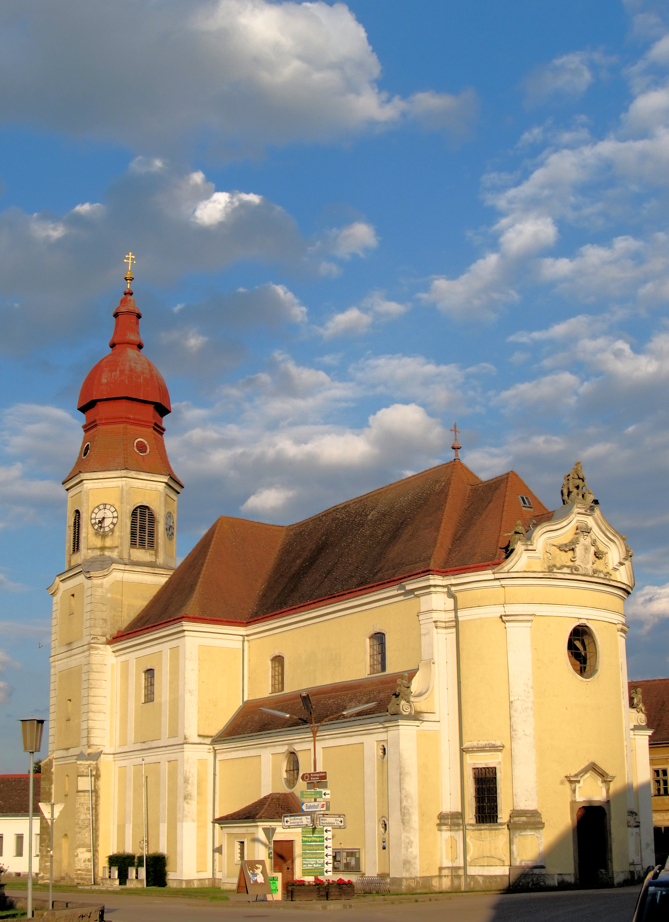 Göllersdorf - Katholische Pfarrkirche hl. Martin (im Juni 2012)